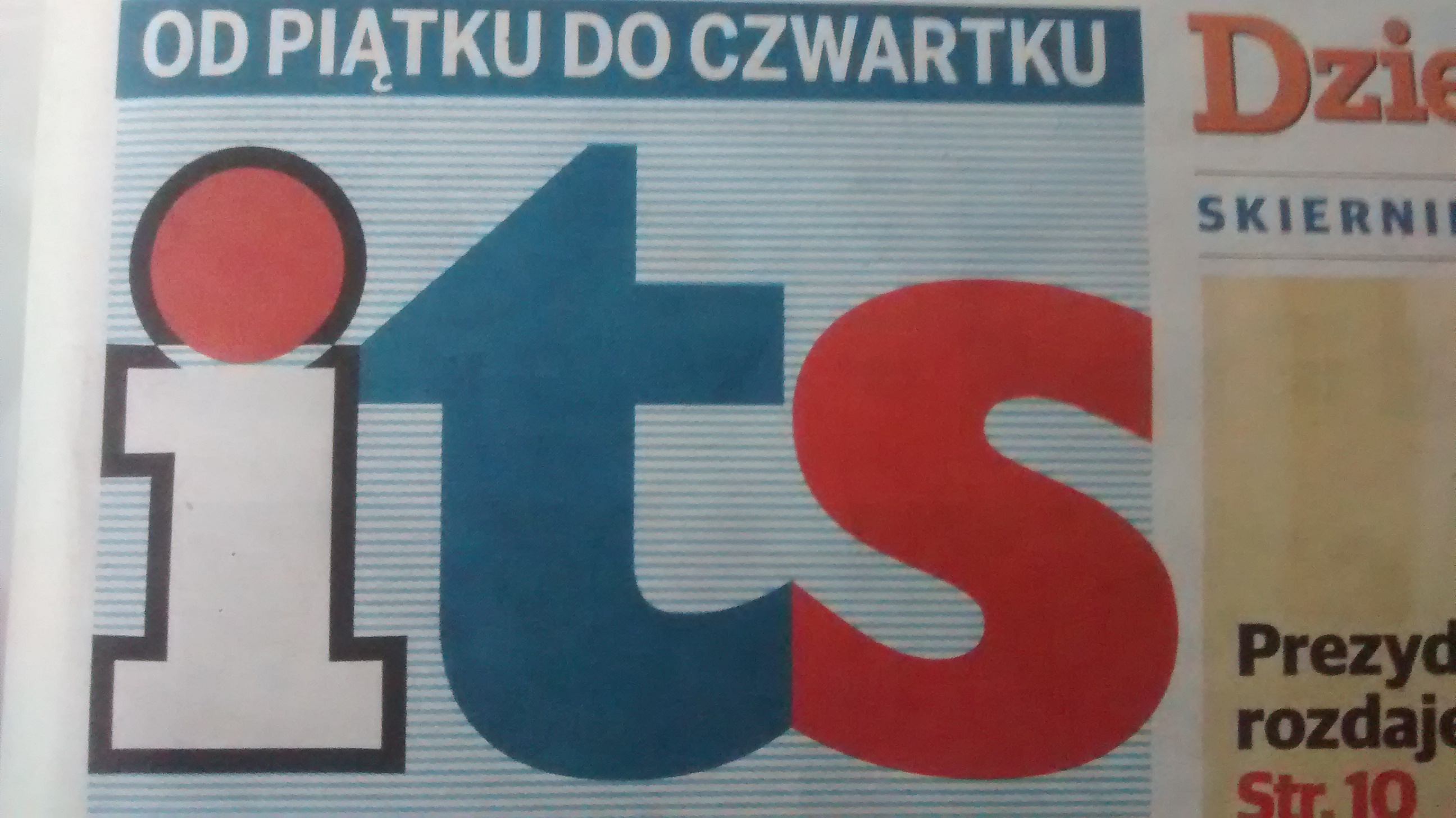 Informator Tygodniowy Skierniewic - gazeta lokalna